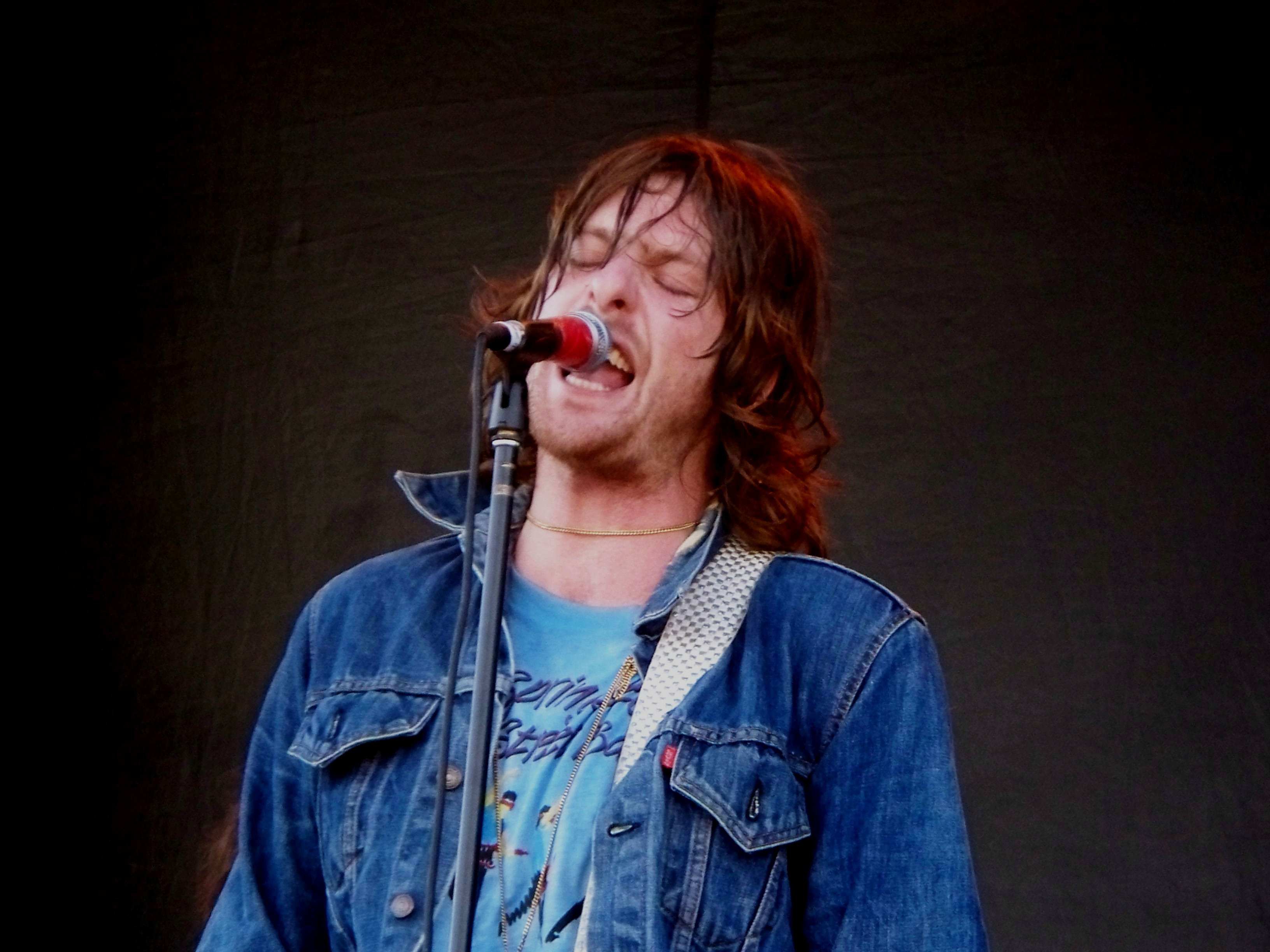 2008 Ottawa, ON